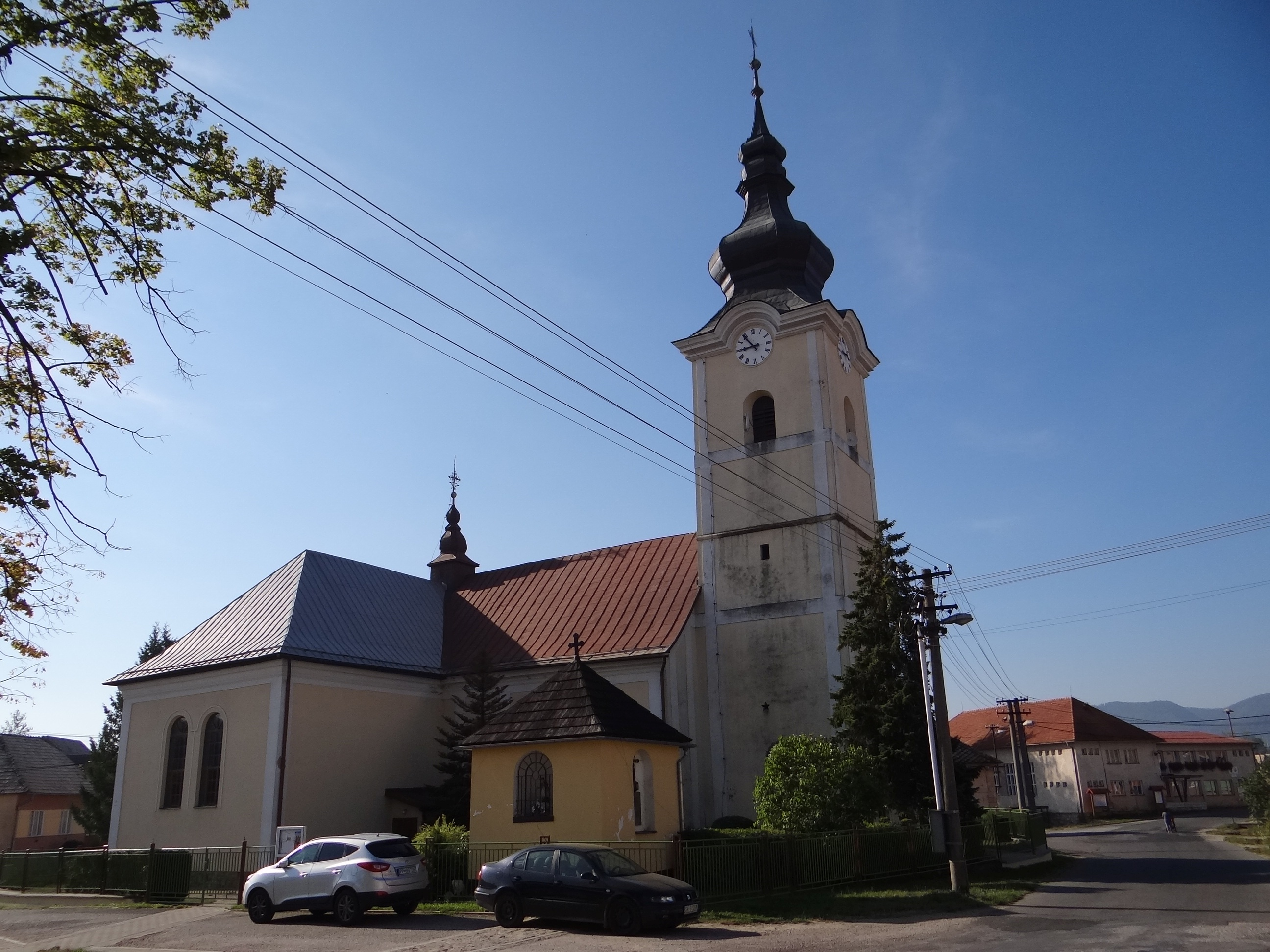 Rímsko-katolícky kostol Všetkých svätých, Letanovce